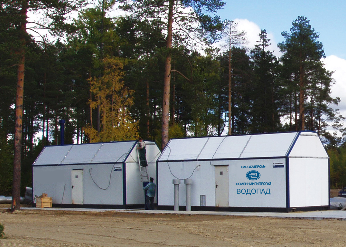 Водопад (станция водоподготовки) производства Экспериментального завода ООО «ТюменНИИгипрогаз». Ханты-Мансийский автономный округ - Югра. 17 июля 2012 года